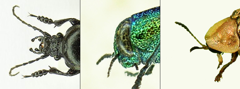 Vabalų galvos. Iš kairės į dešinę: Prognatinė (Miškinio puošniažygio (Carabus nemoralis))Ortognatinė (Liepinio blizgiavabalio (Ovalisia rutilans))Hipognatinė (Runkelinio skydinuko (Cassida nebulosa))